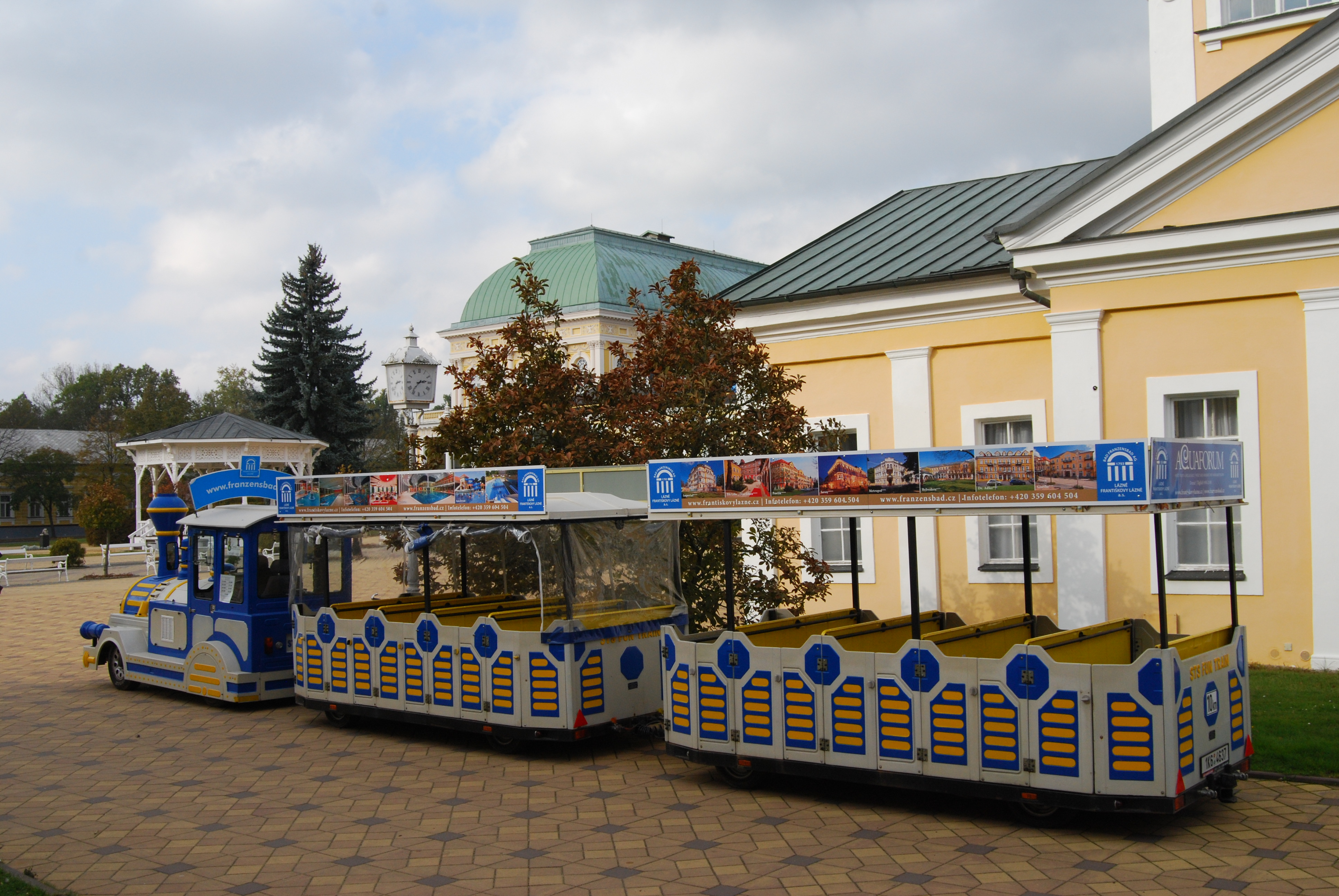 Mikrovláček-frantovláček. Františkovy Lázně. Okres Cheb. Čechy.